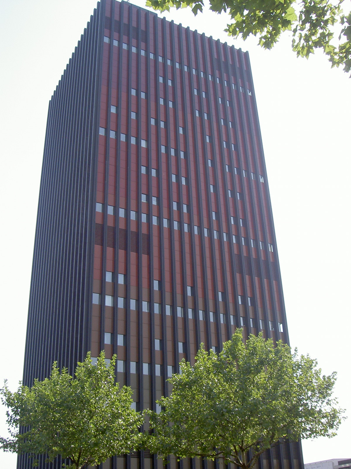 Deutsche Welle - Köln